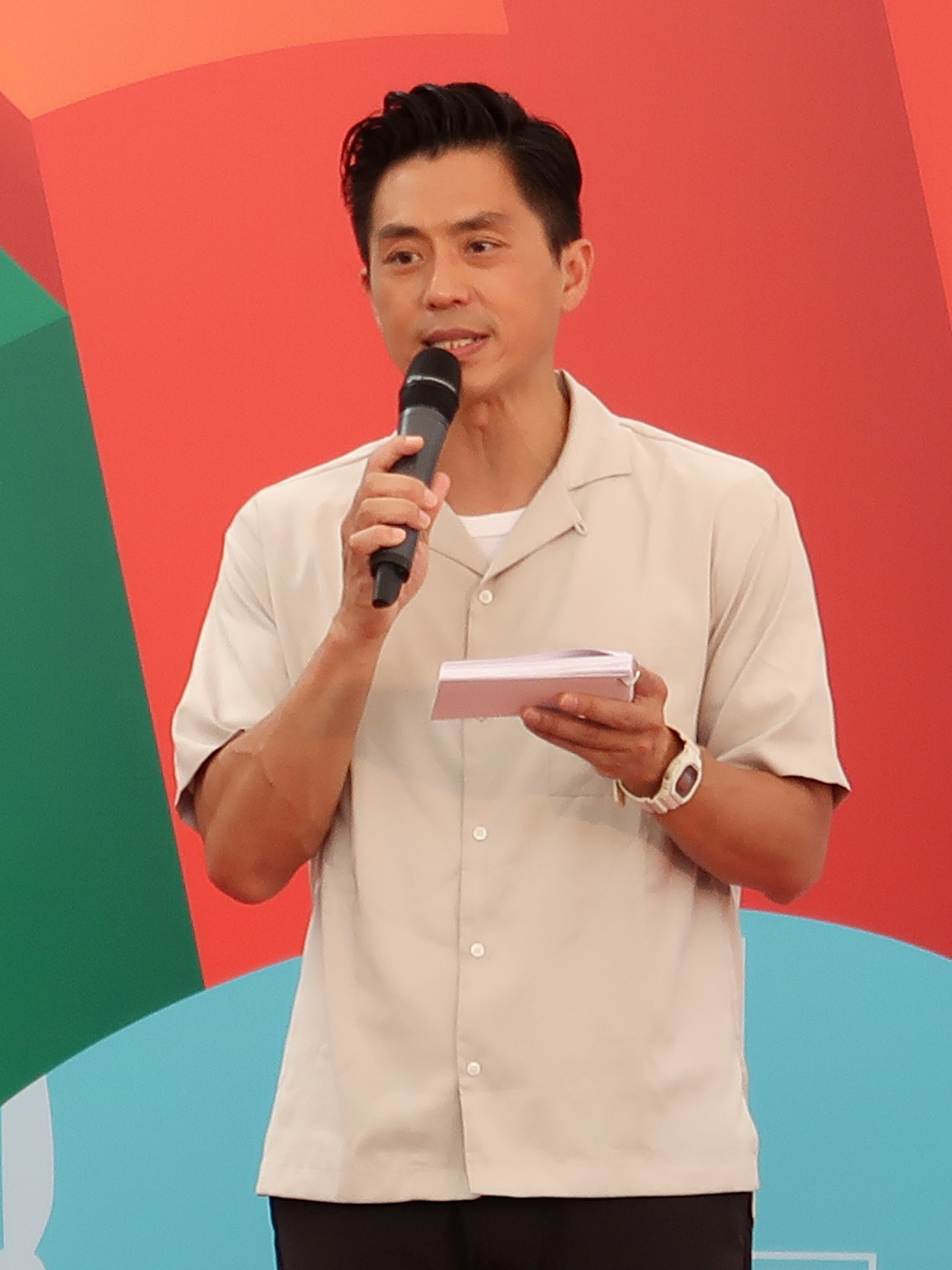 Sammy Leung